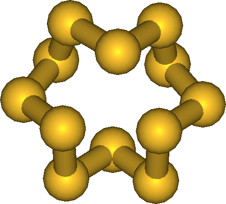 cyclo-dodecasulfur allotrope